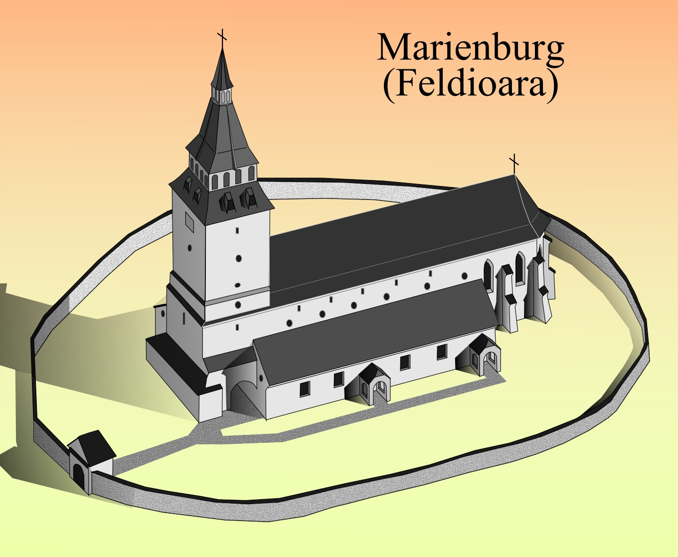 Biserica evanghelica din Feldioara, Brasov.